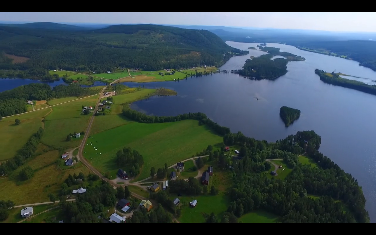 vängel augusti 2016